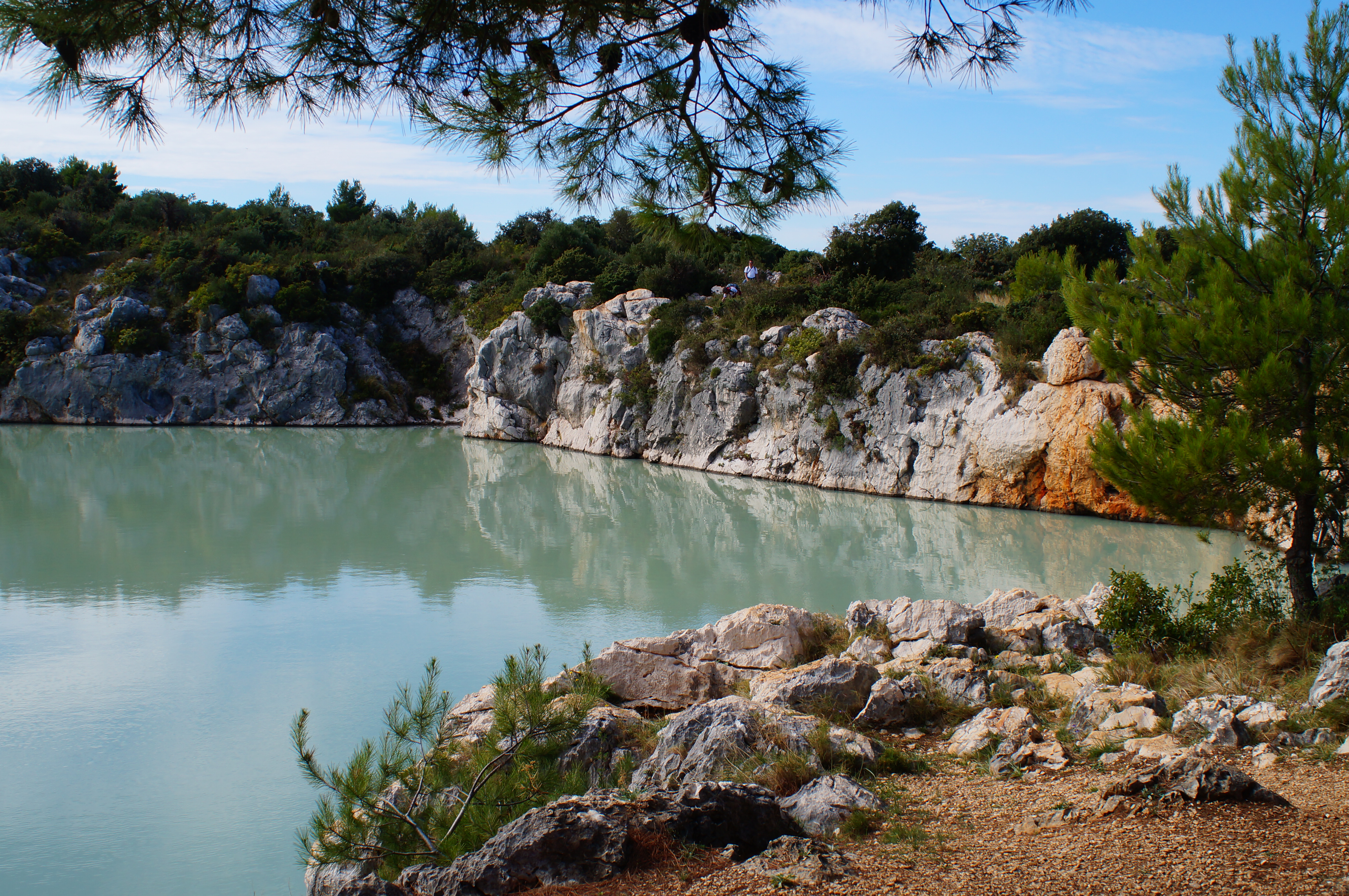 Trübung des Drachenaugensees, Oktober 2016